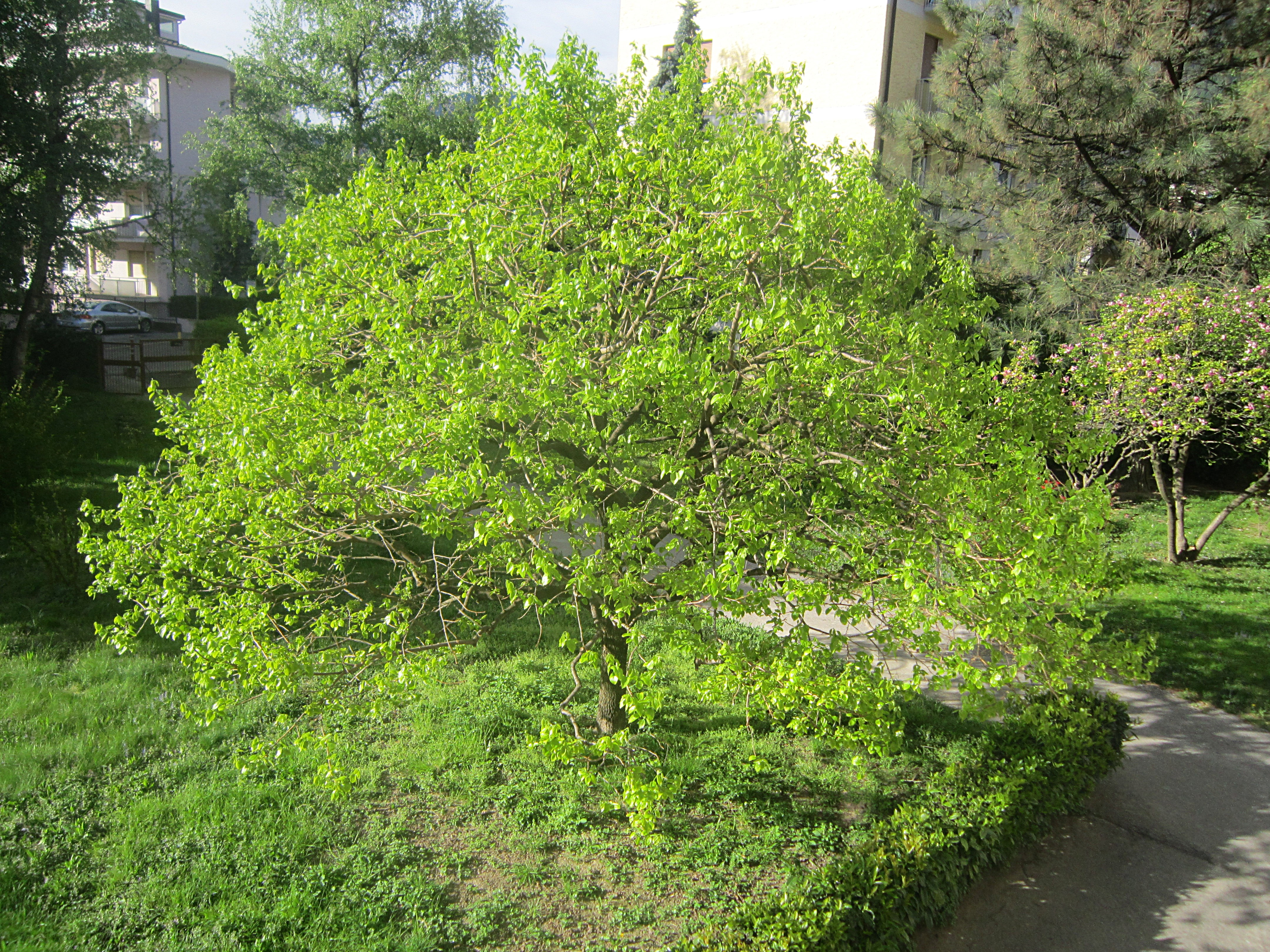 Kakinokarbo kun printempaj folioj